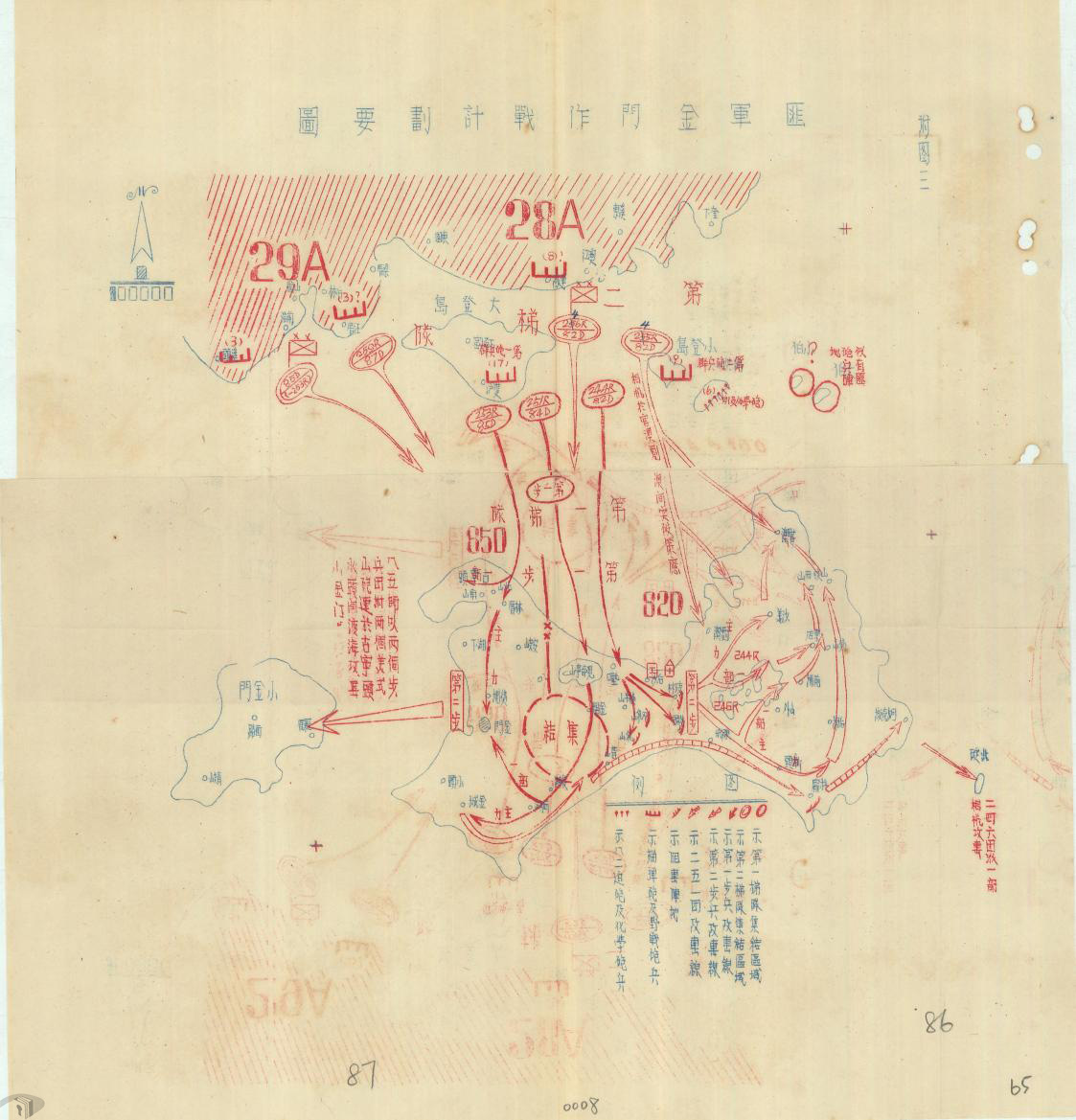 古寧頭戰役共軍計劃以兩梯隊攻打金門